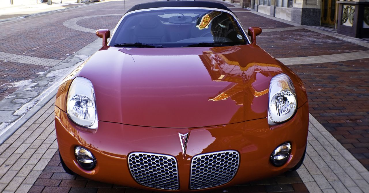 Auto en Indianapolis, Indiana, Estados Unidos.